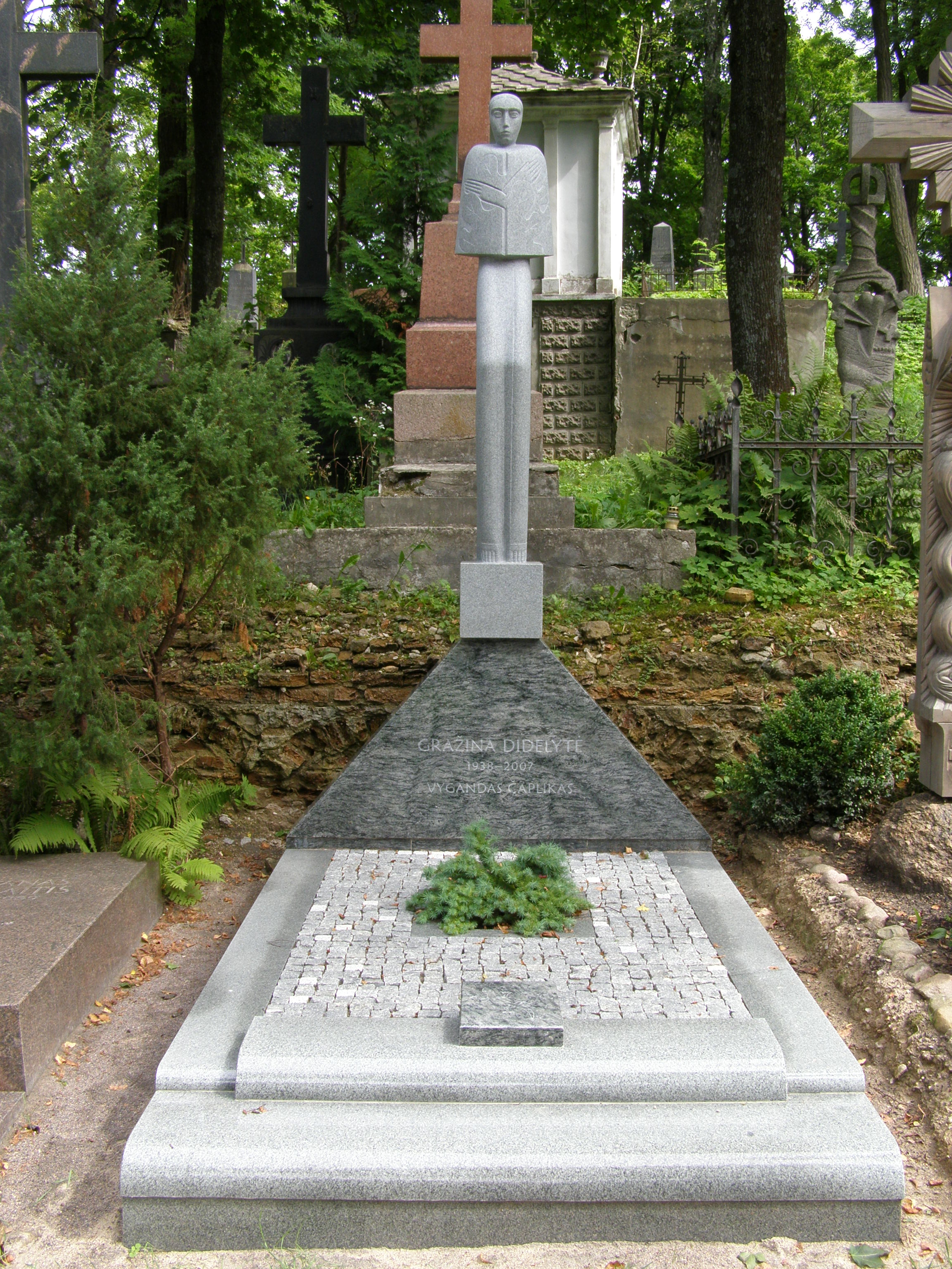 Cmentarz Na Rossie w Wilnie - grób Grażyny Didelyte